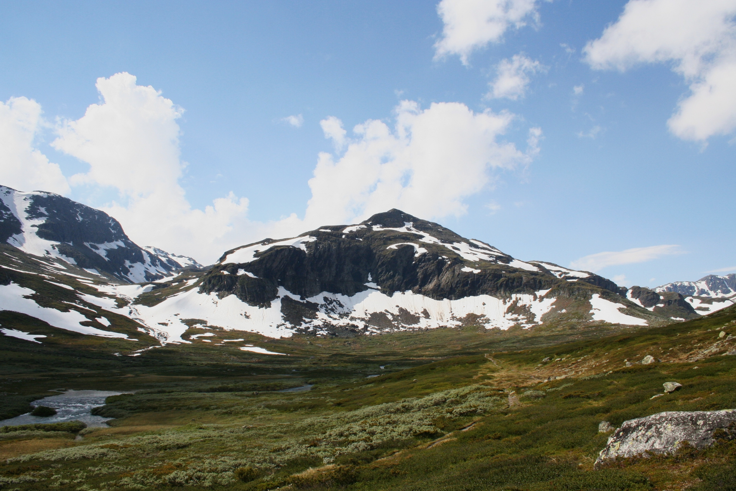 Raggsteinnuten, Norway, 1586 msl.